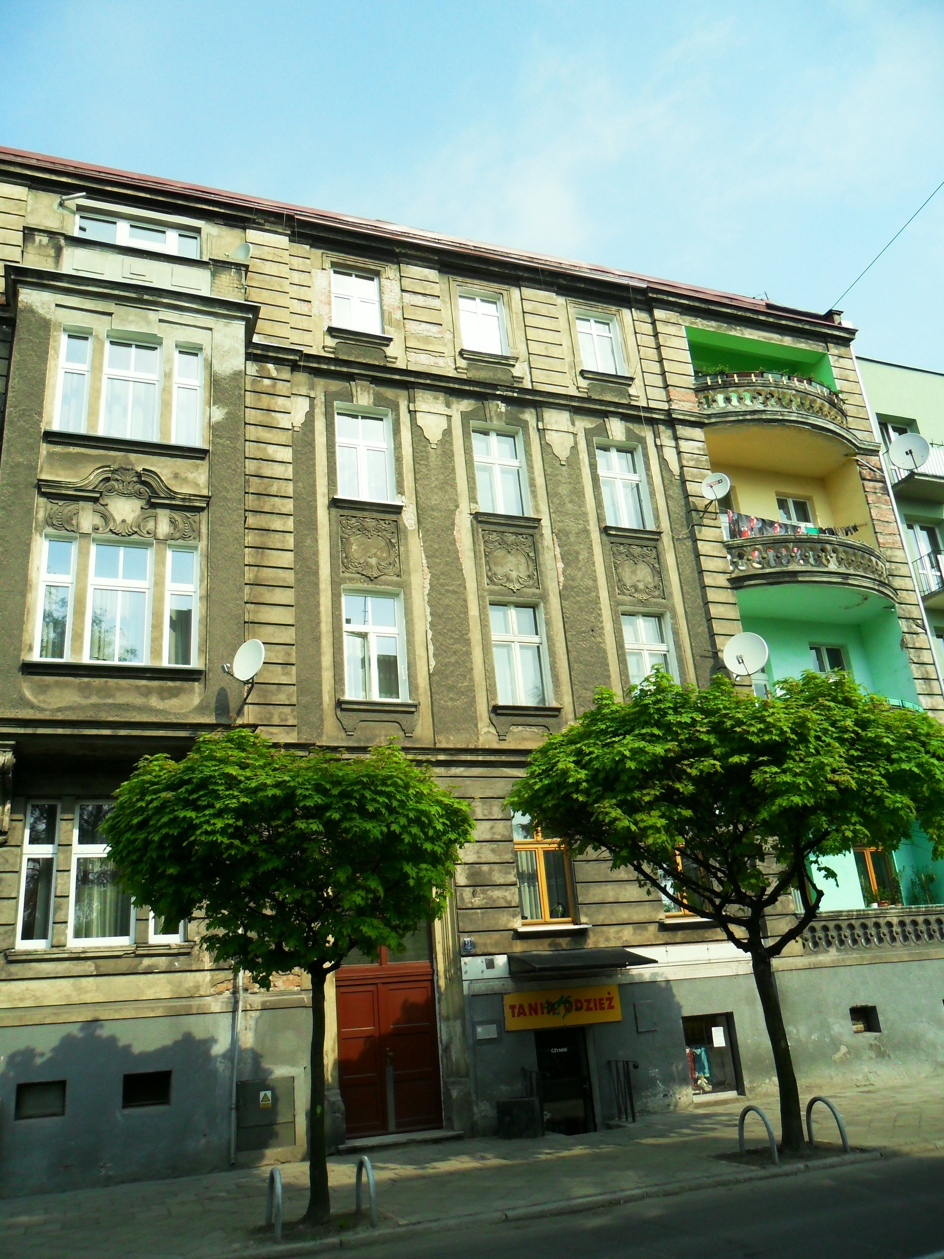 Kamienica przy ulicy Wileńskiej 13 w Raciborzu.